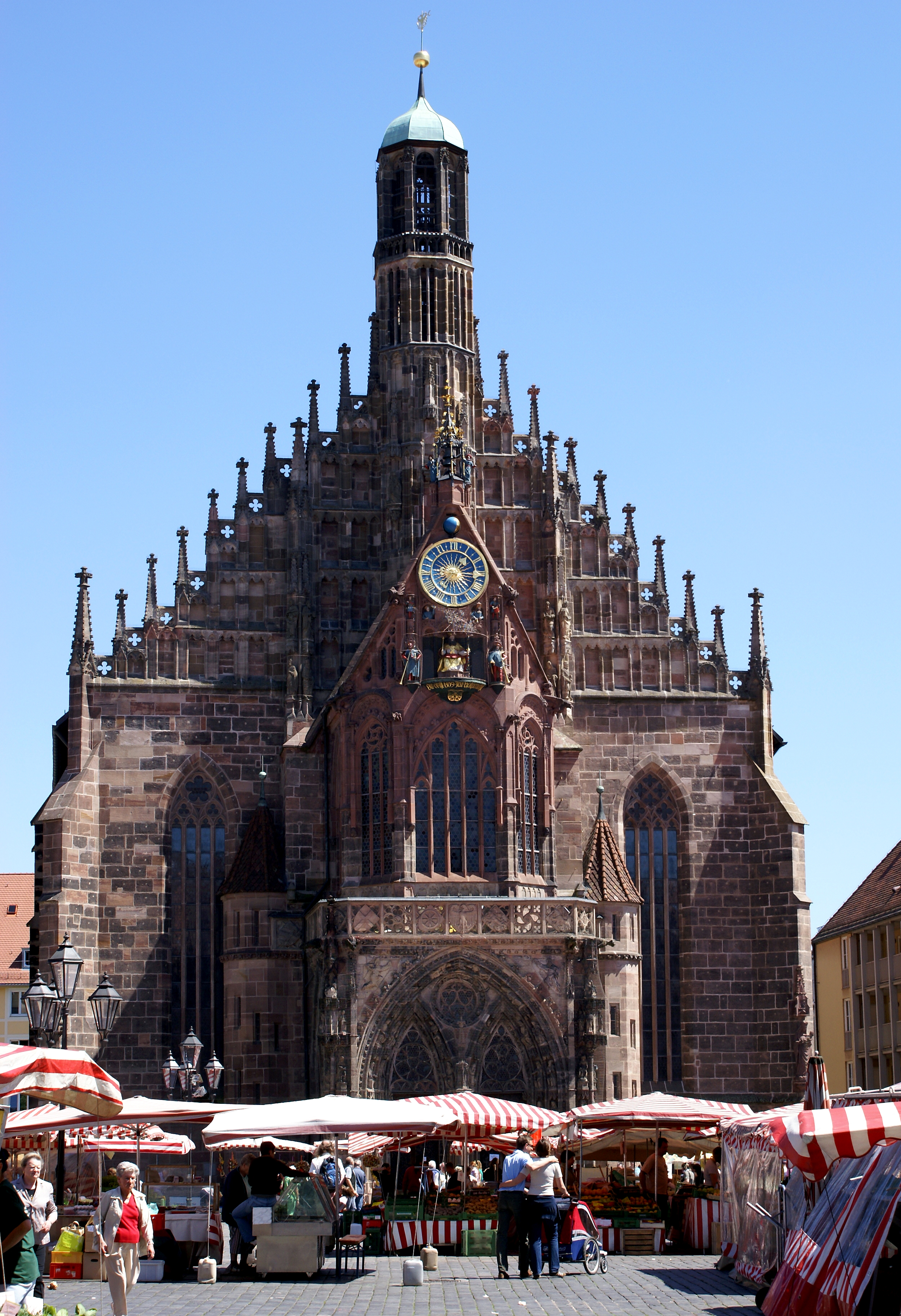 A Miasszonyunk templom Nürnberg főpiacterén